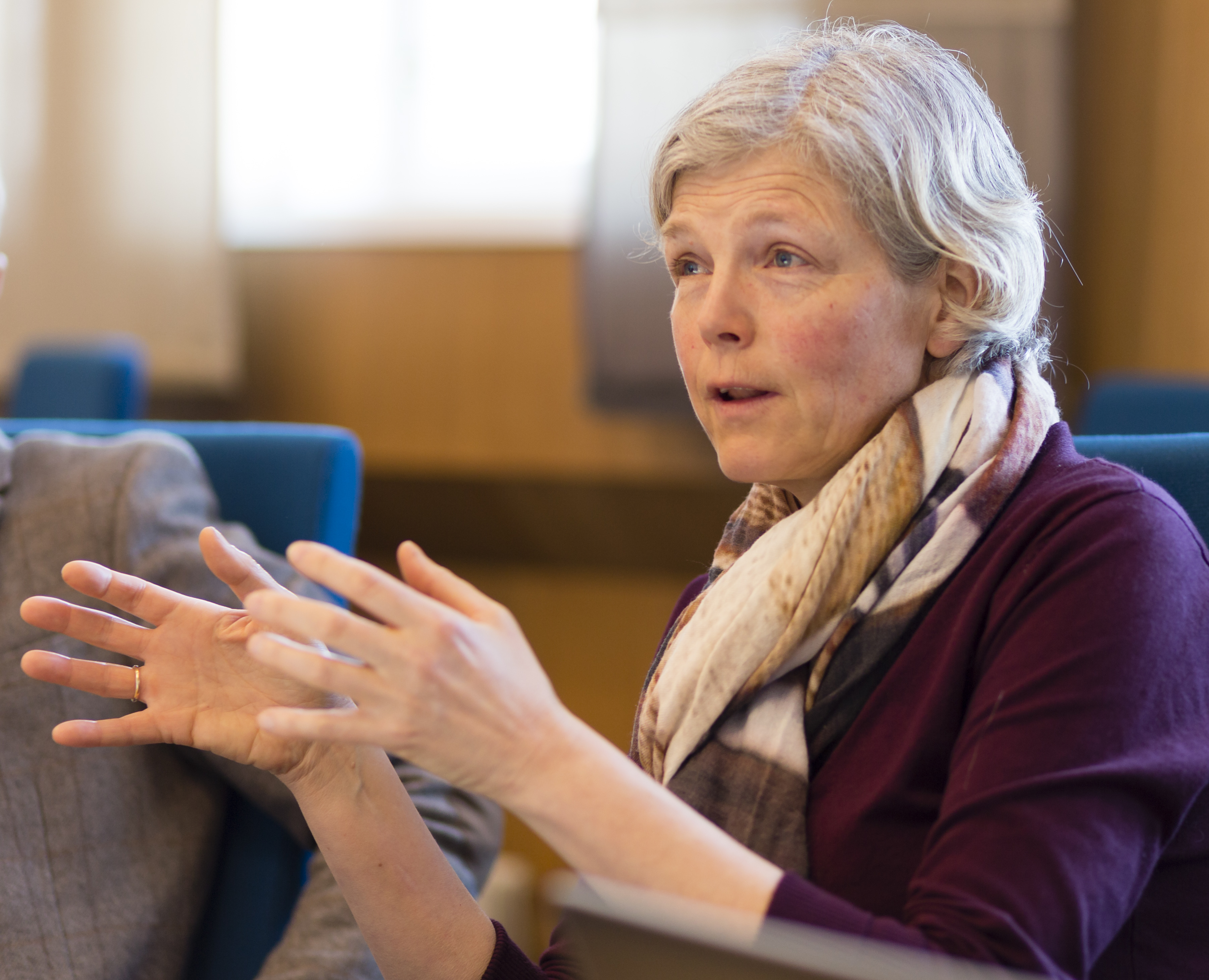 NTNU Fusjonsprosjektet. Gruppa for faglig organisering har i oppgave å utarbeide forslag til hvordan universitetet bør organiseres. Gruppe fotografert ved starten av sitt første møte, 28.april 2015. Foto: Thor Nielsen, Trondheim/NTNU Komm.avd.